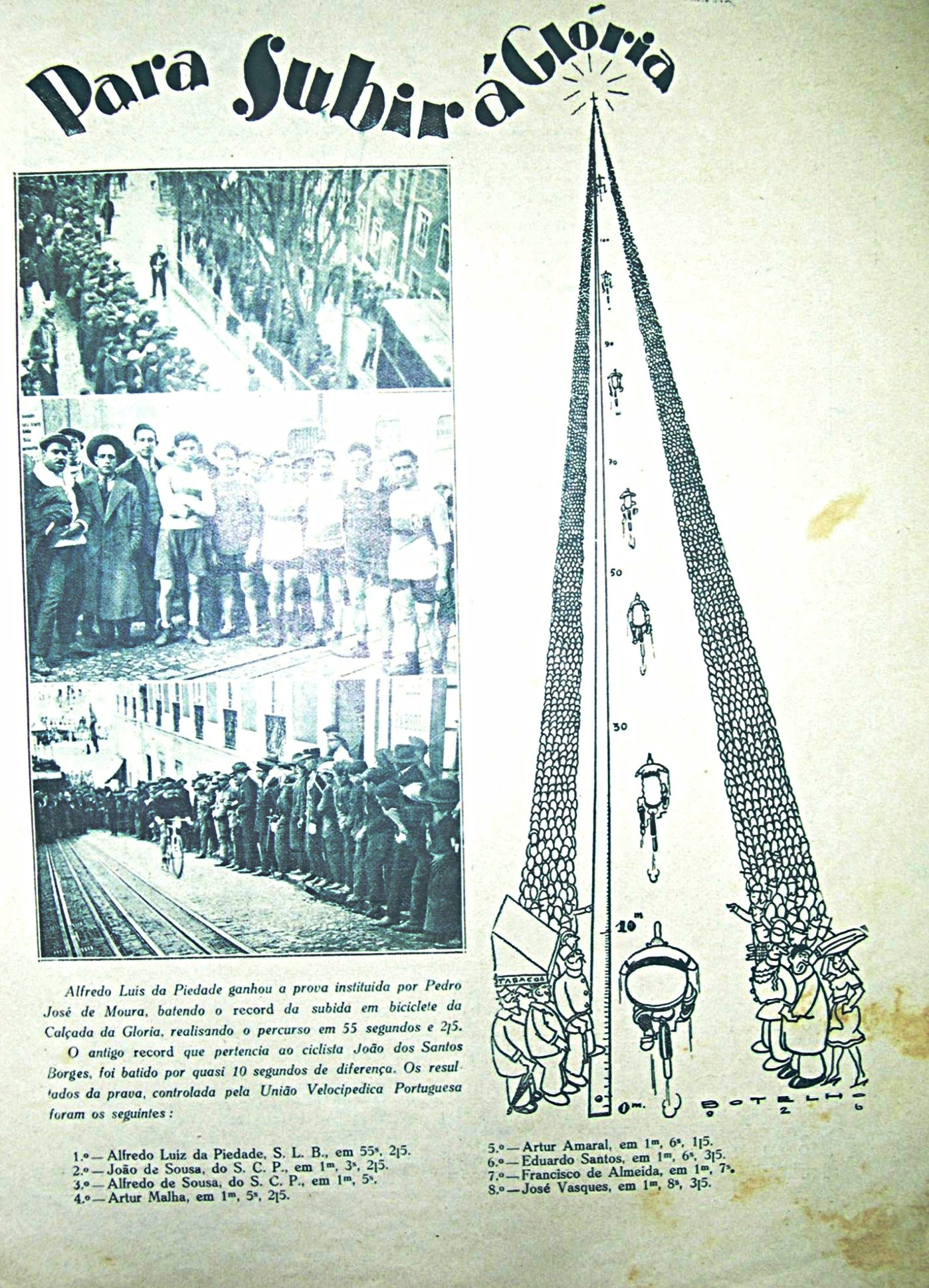 Image of newspaper 1926